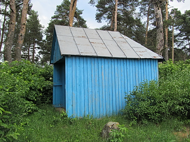 Яруцічы. Капліца на могілках